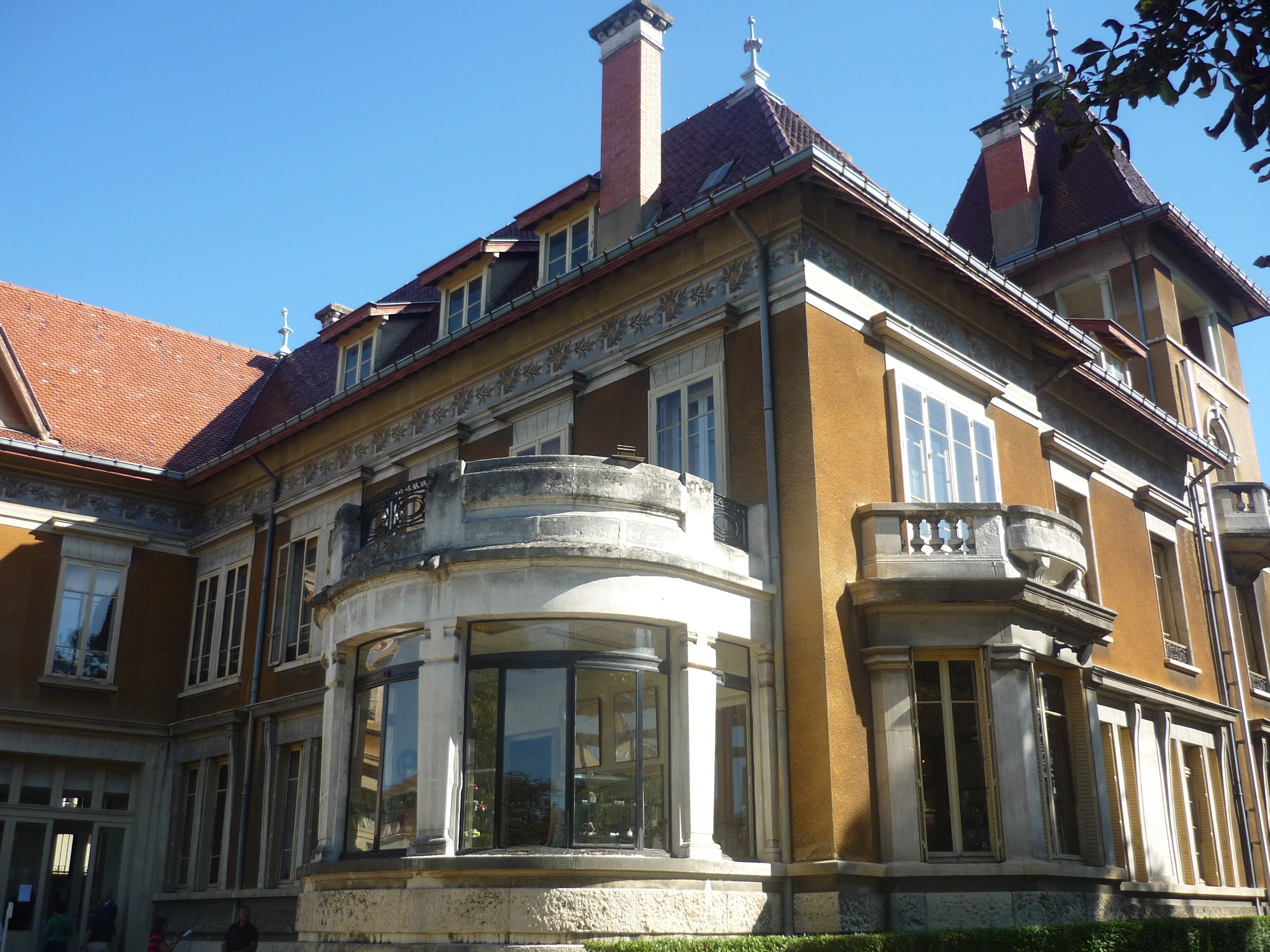 Villa Berliet dans le 3e arrondissement de Lyon. Inscrit au titre des monuments historiques .